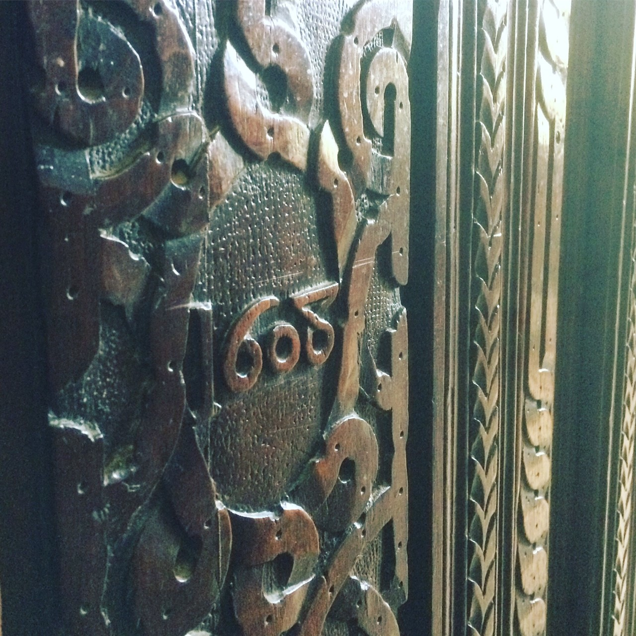 photographie d'un meuble de style "renaissance", daté de 1608, conservé au Manoir du Clap